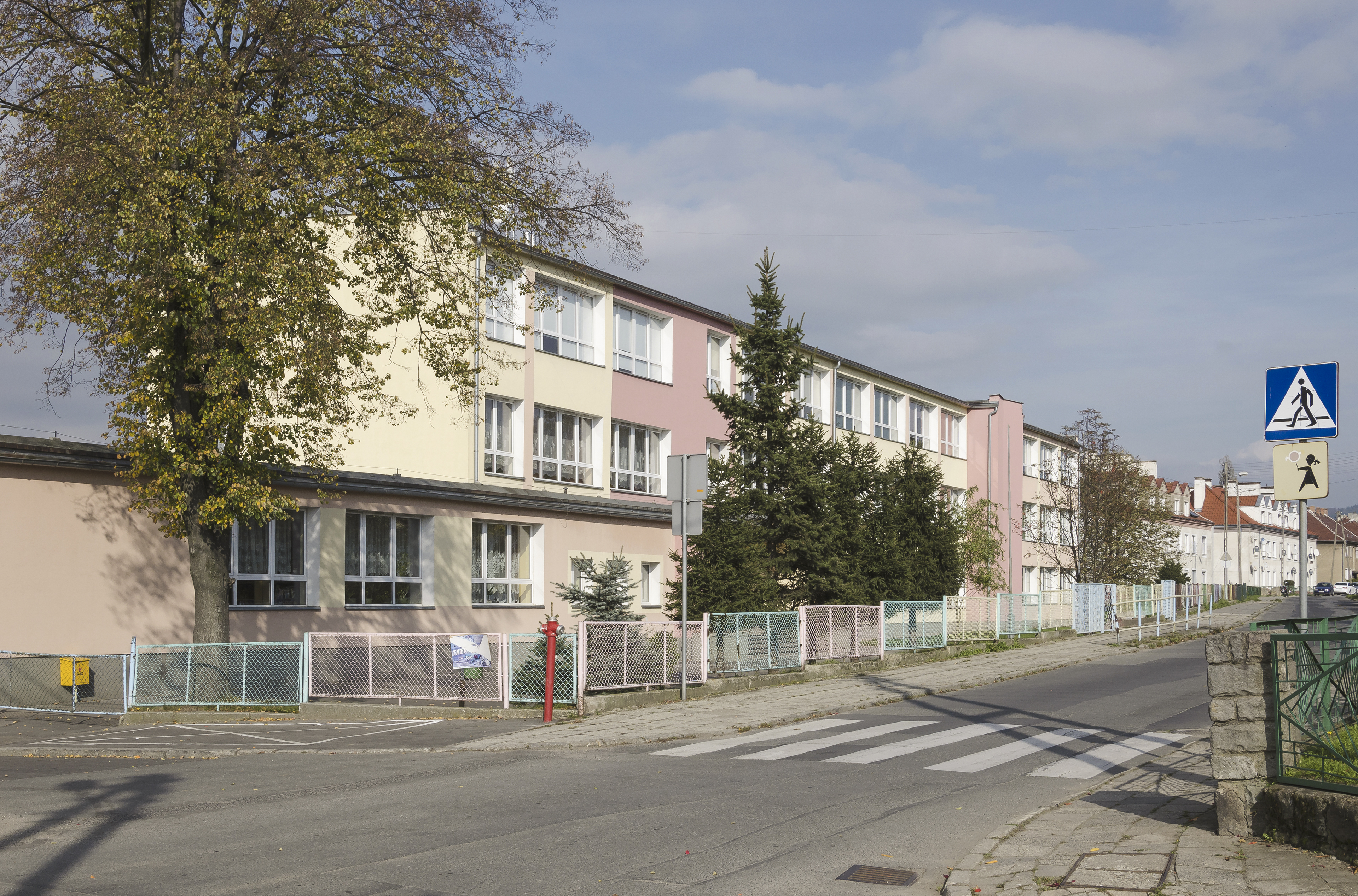 Kłodzko, ul. Sienkiewicza, szkoła podstawowa nr 7